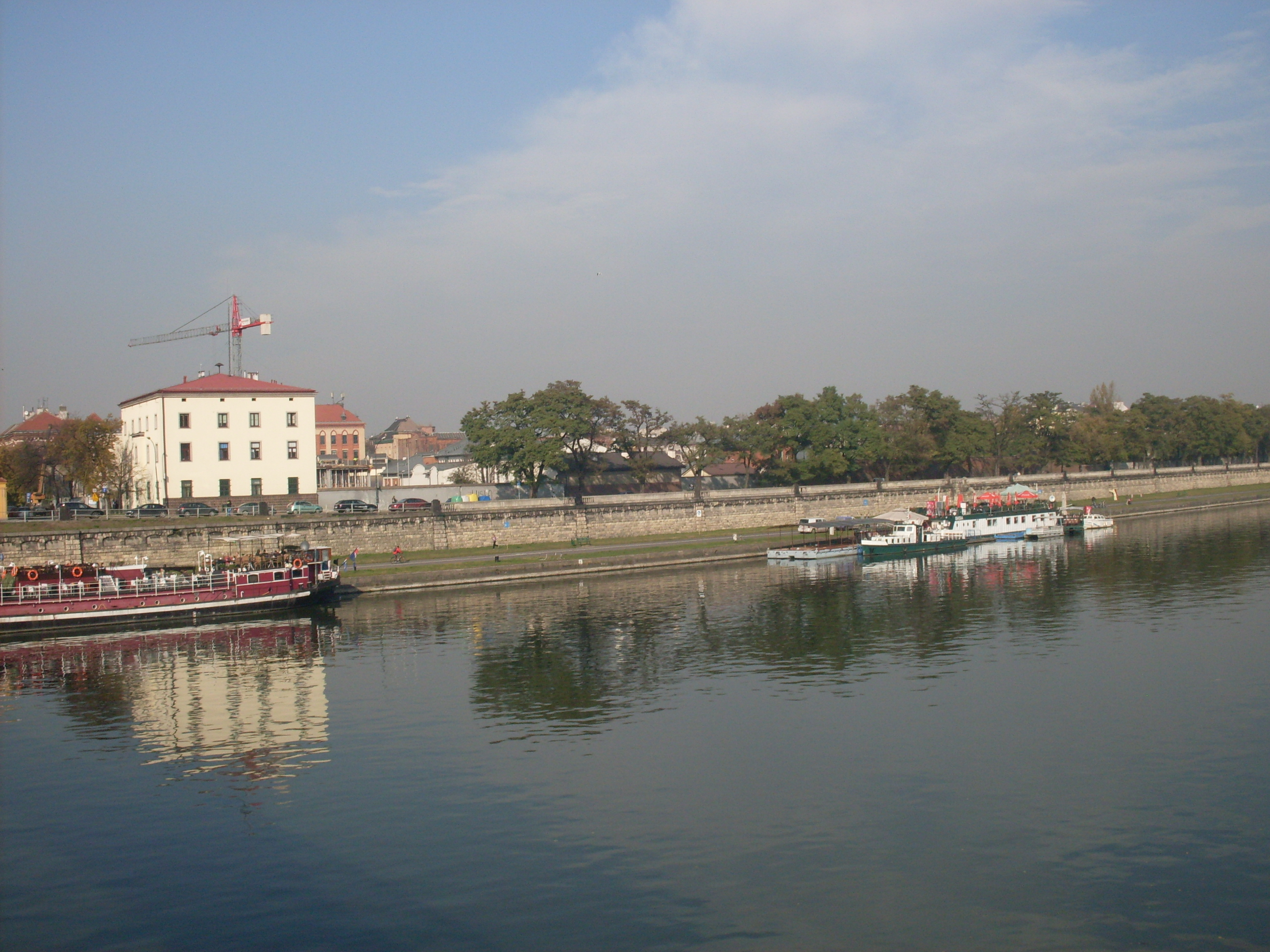 Bulwar Kurlandzki